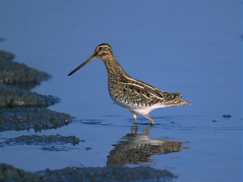 Gallinago gallinago（田鷸）, Changhua County, Taiwan, 2007.